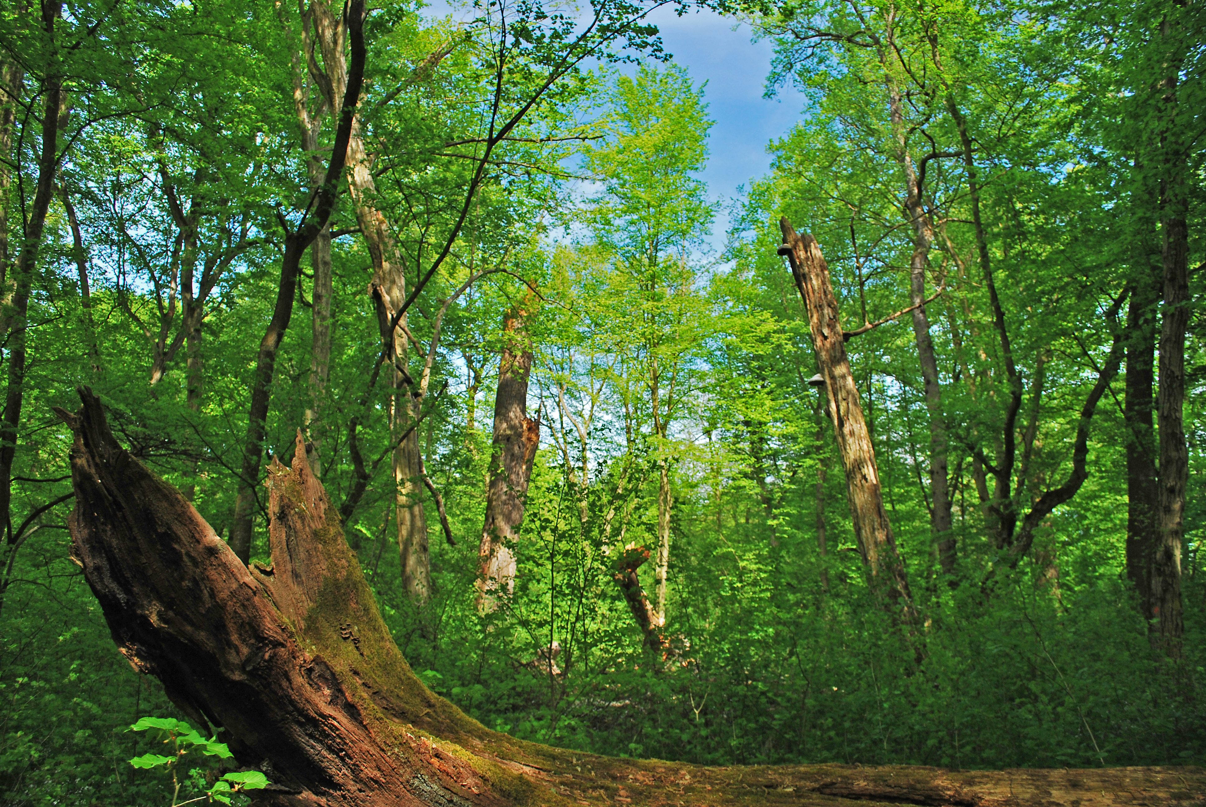 NPR Ranšpurk